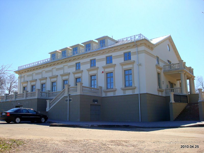 Дворец в Крикштенай